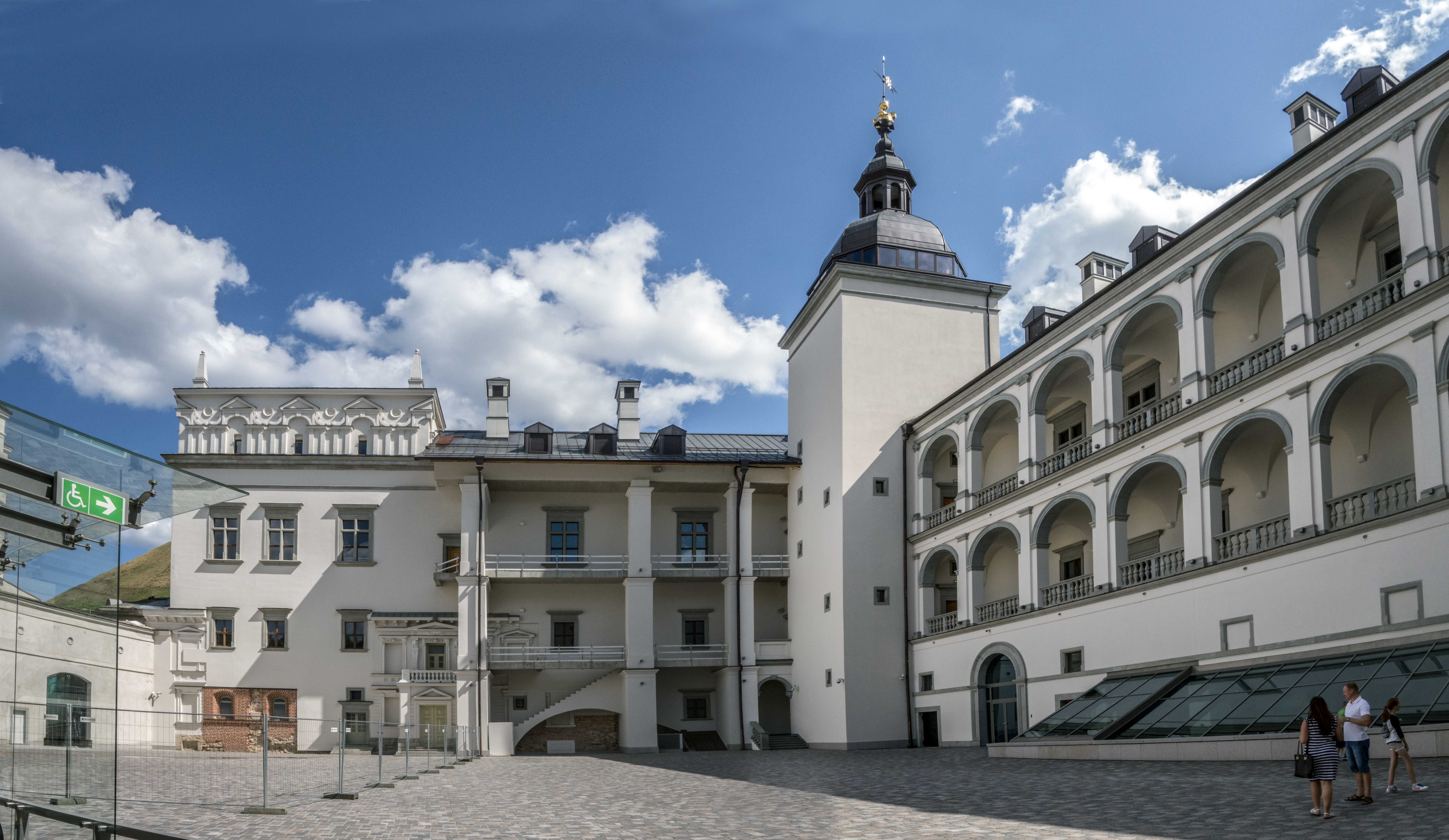 Zamek Dolny - dziedziniec